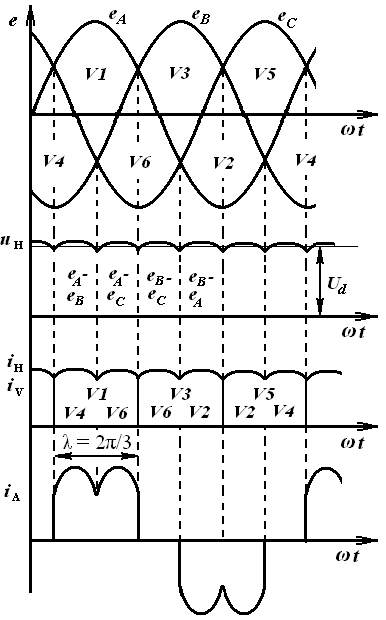 Часові діаграми струмів і напруг мостової схеми